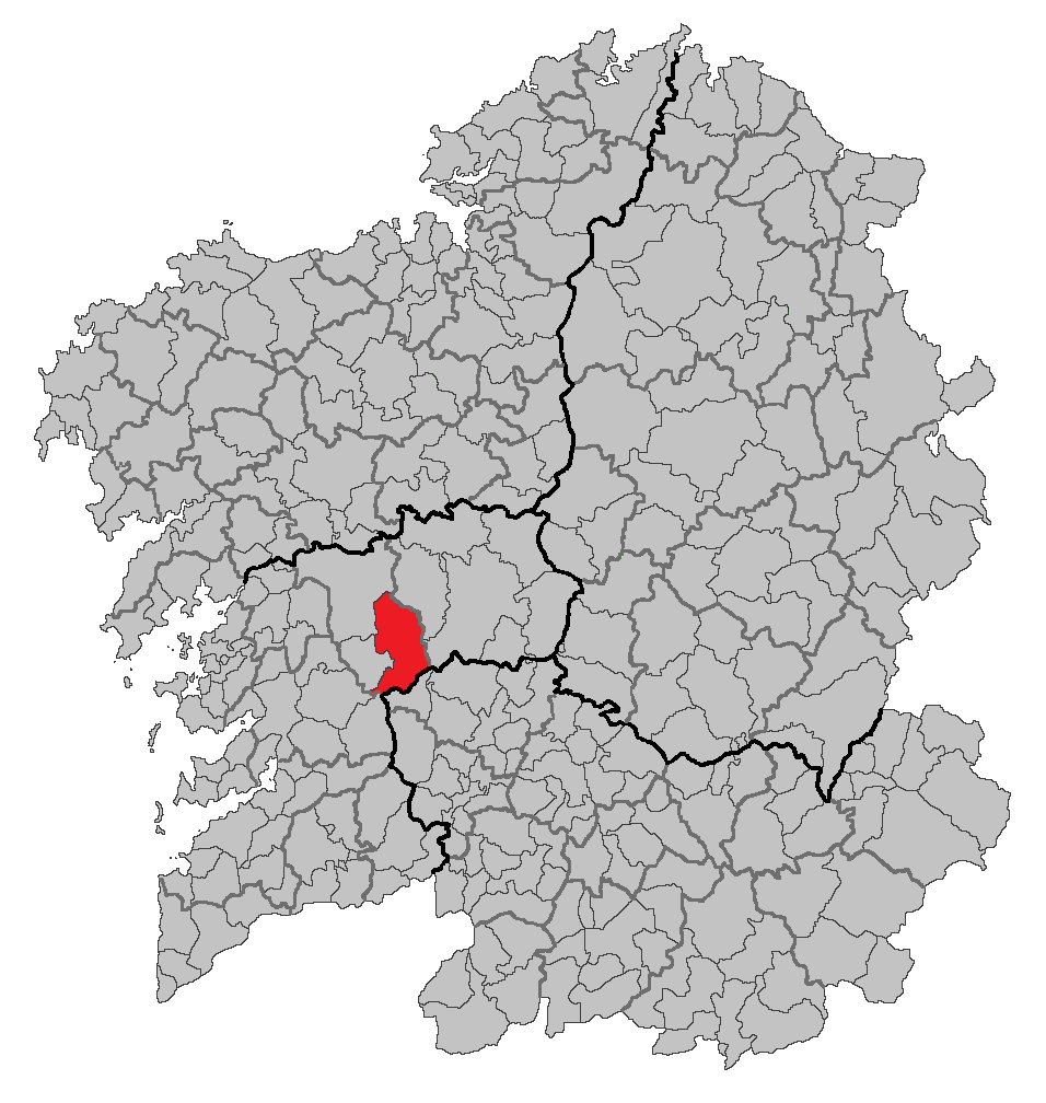 Mapa coa localización do concello de Forcarei.